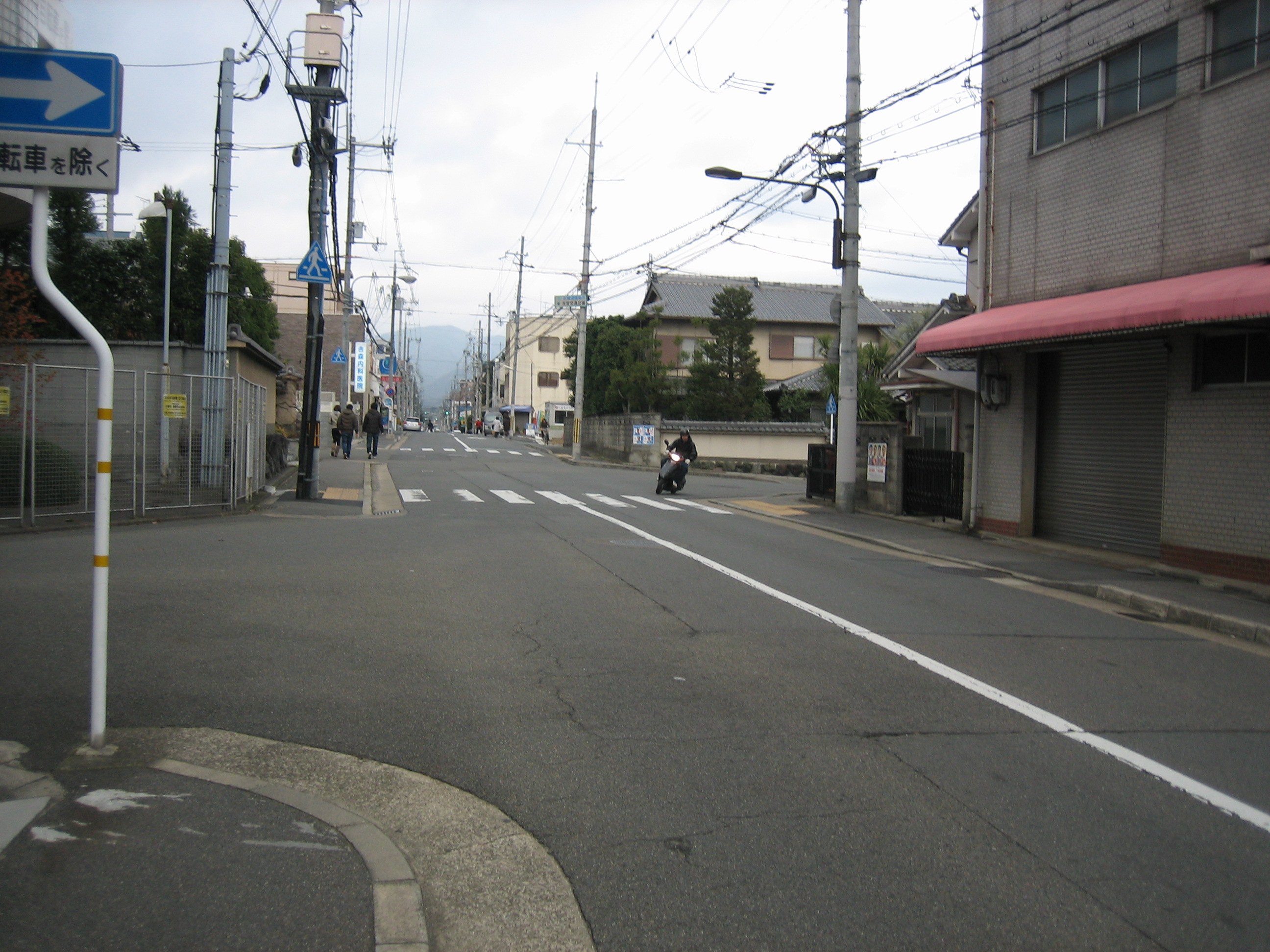 紫竹西通を京都市北区大宮開町から撮影